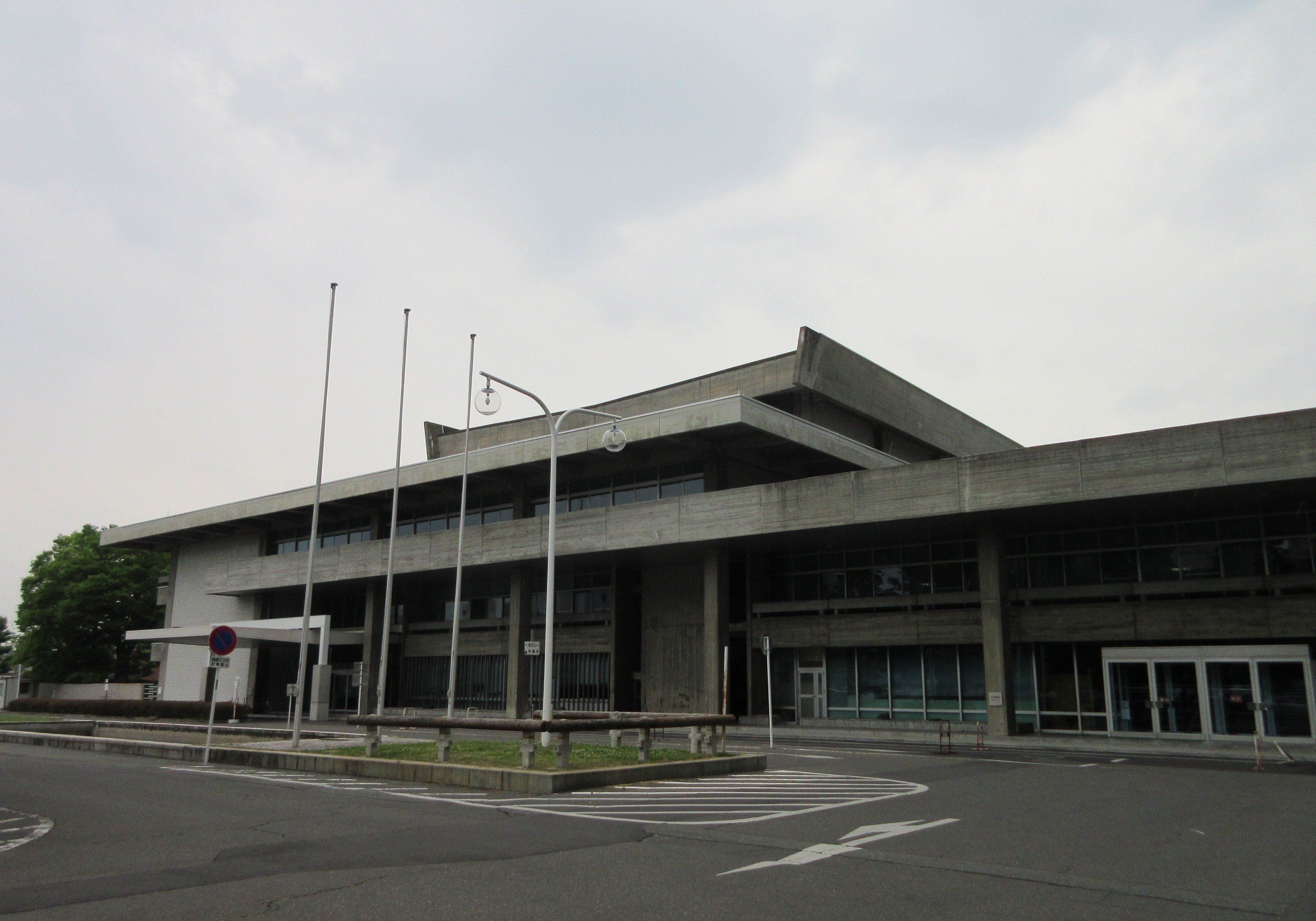 長野県庁議会棟